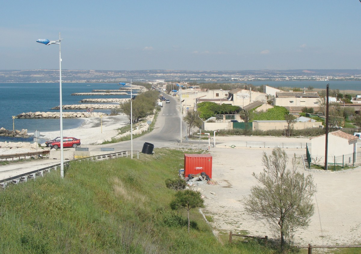 Le hameau du Jaï sur la commune de Châteauneuf-les-Martigues. A gauche l'étang de Berre, à droite l'étang de Bolmon.